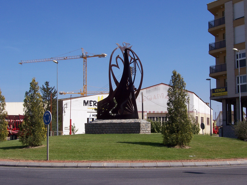 Rotonda de la N-II a Golmés